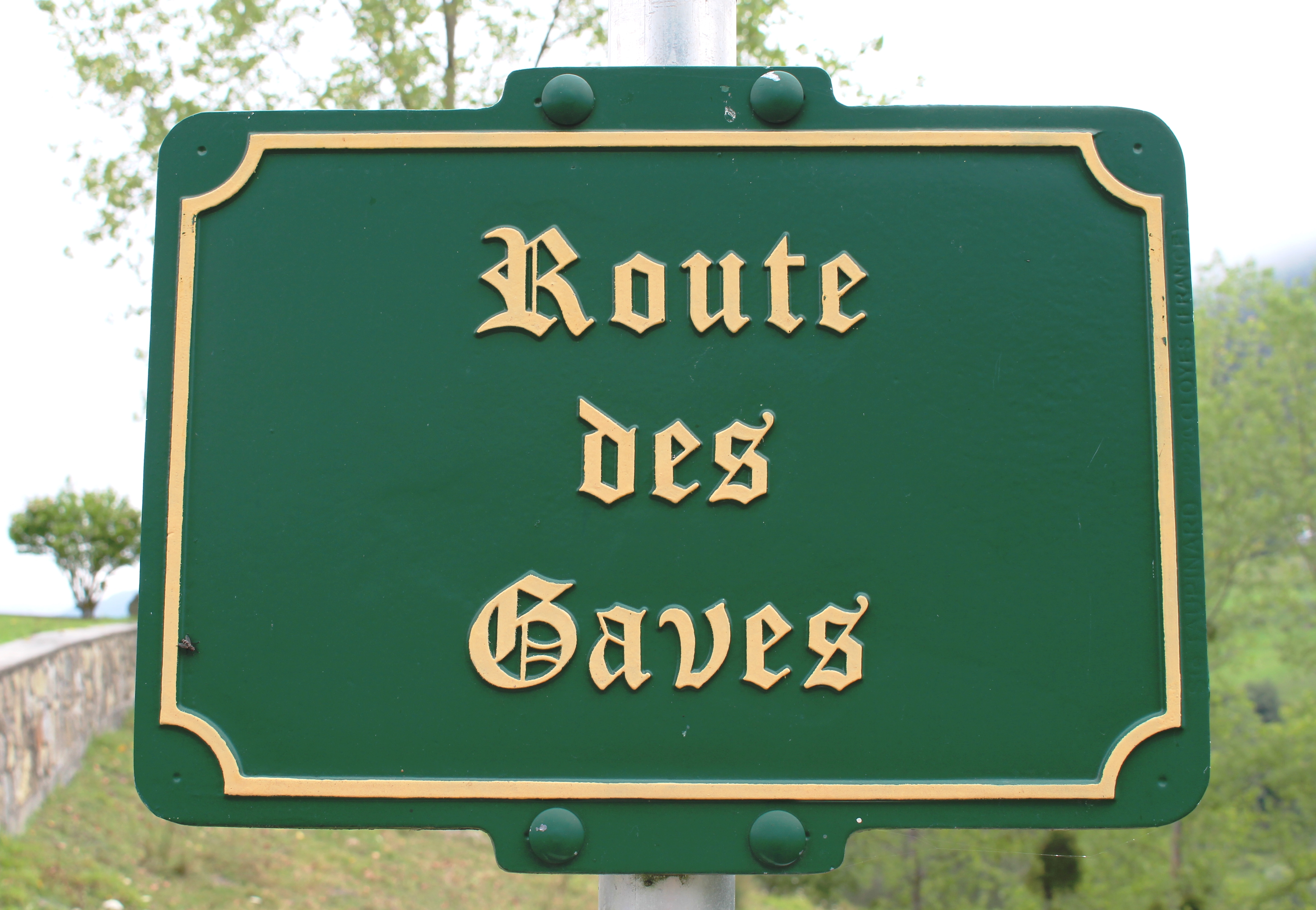 Rue du village de Bun (Hautes-Pyrénées)